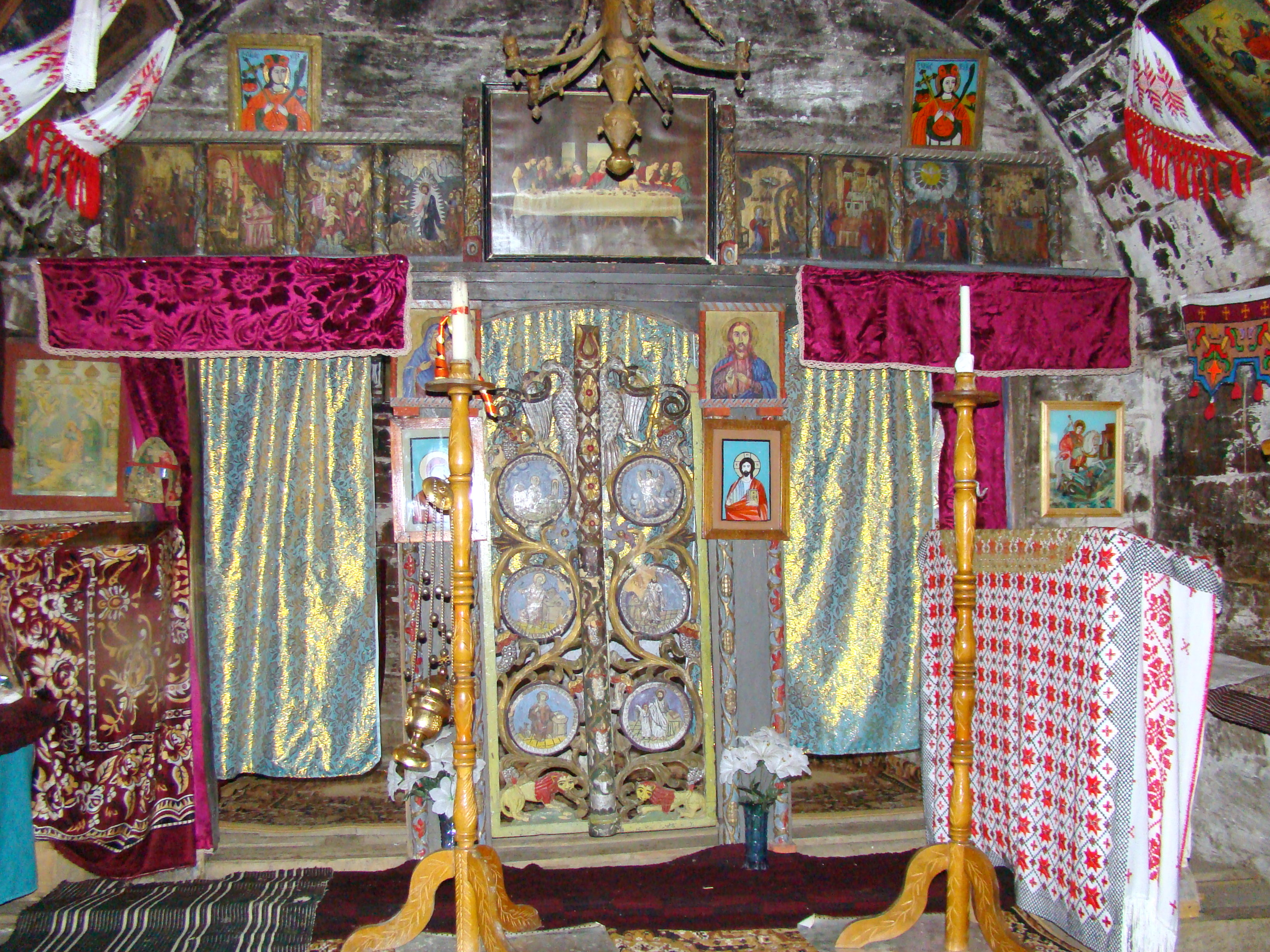 Biserica de lemn „Înălţarea Sfintei Cruci" din Pruneni